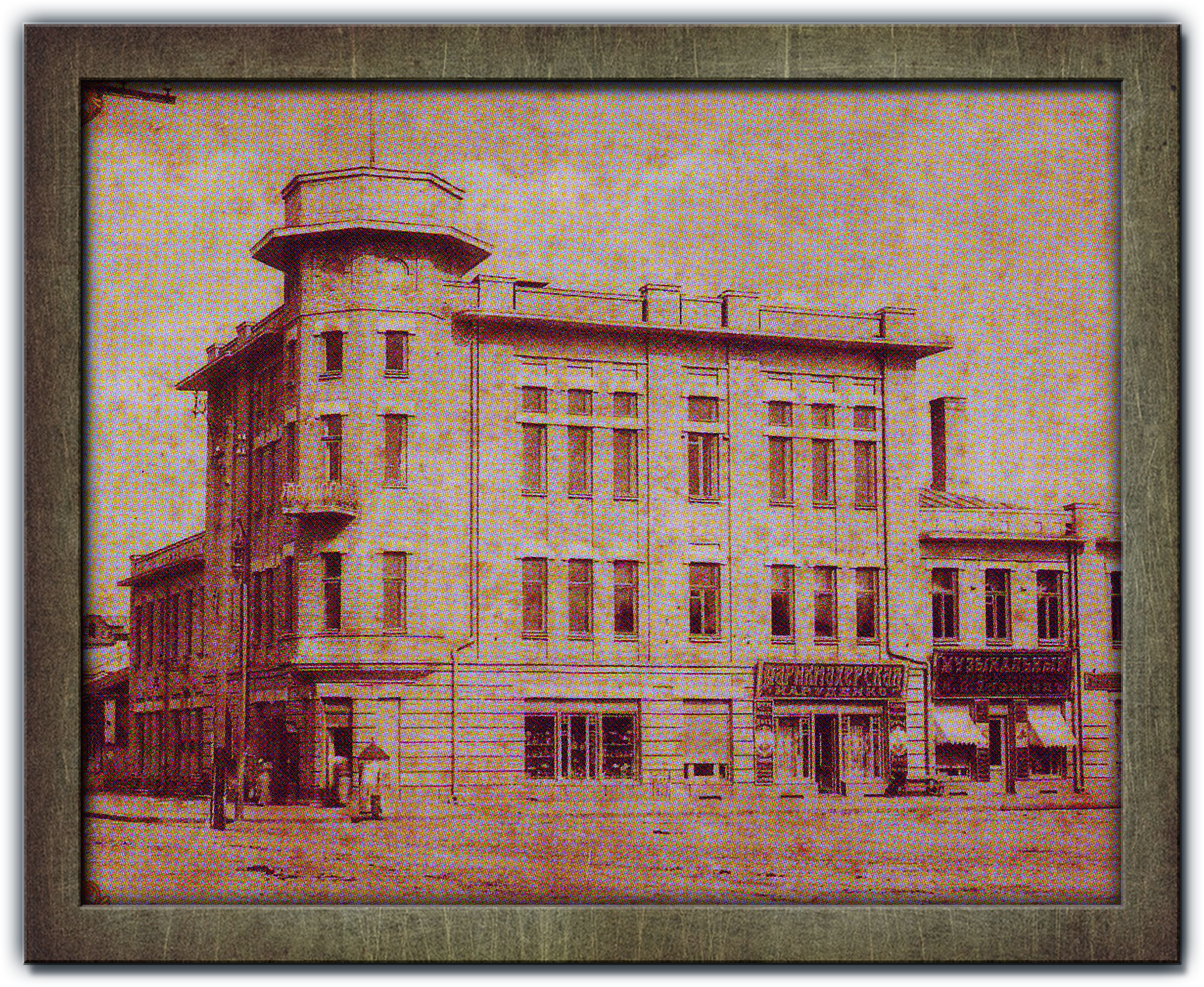 Здание городской управы